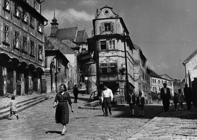 Duch doby; někdy také: Mikulášska a Židovská ulica 1930 - 1939